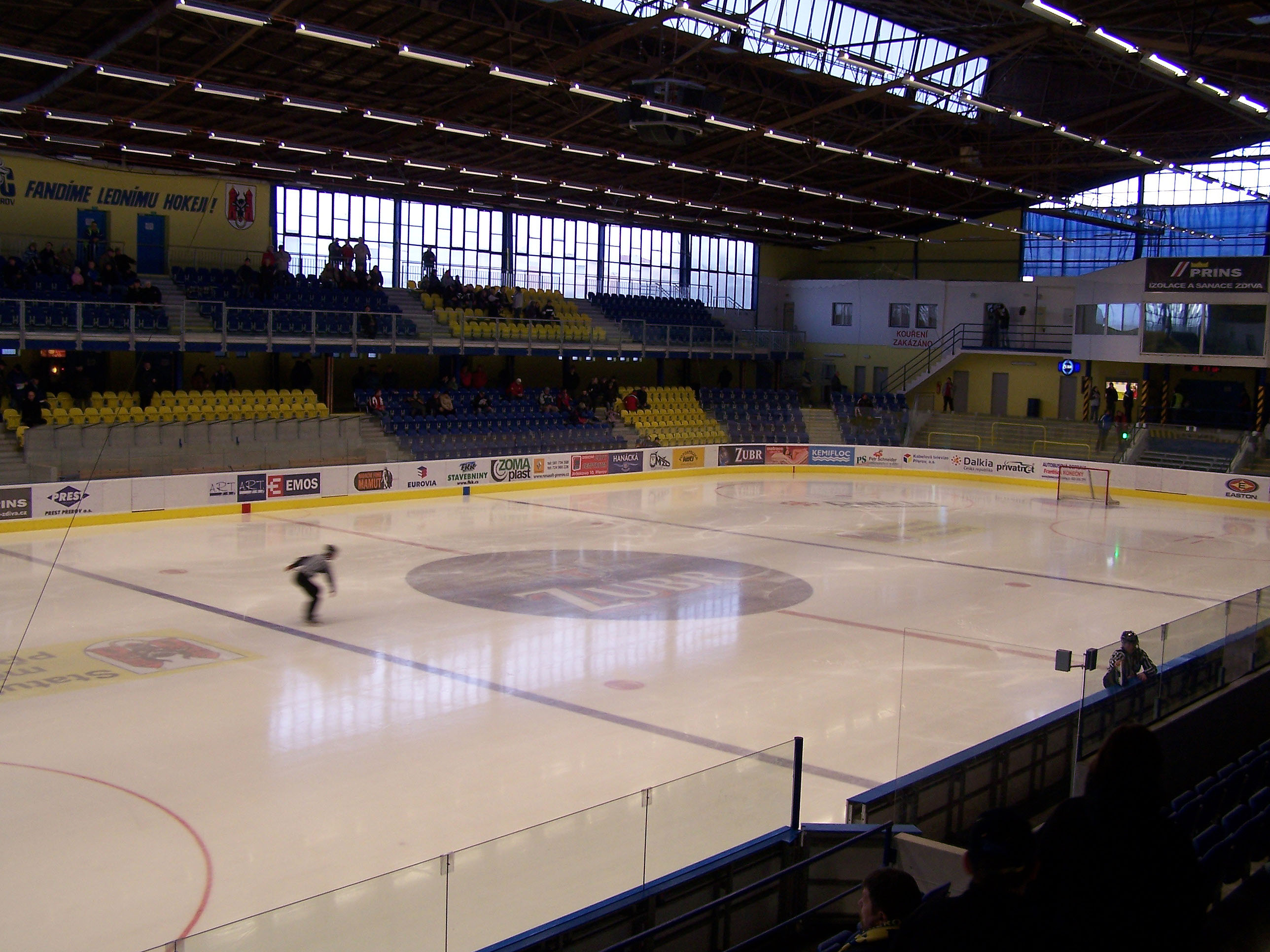 Zimní stadion Přerov, home arena of HC ZUBR Přerov in Přerov, Czech Republic